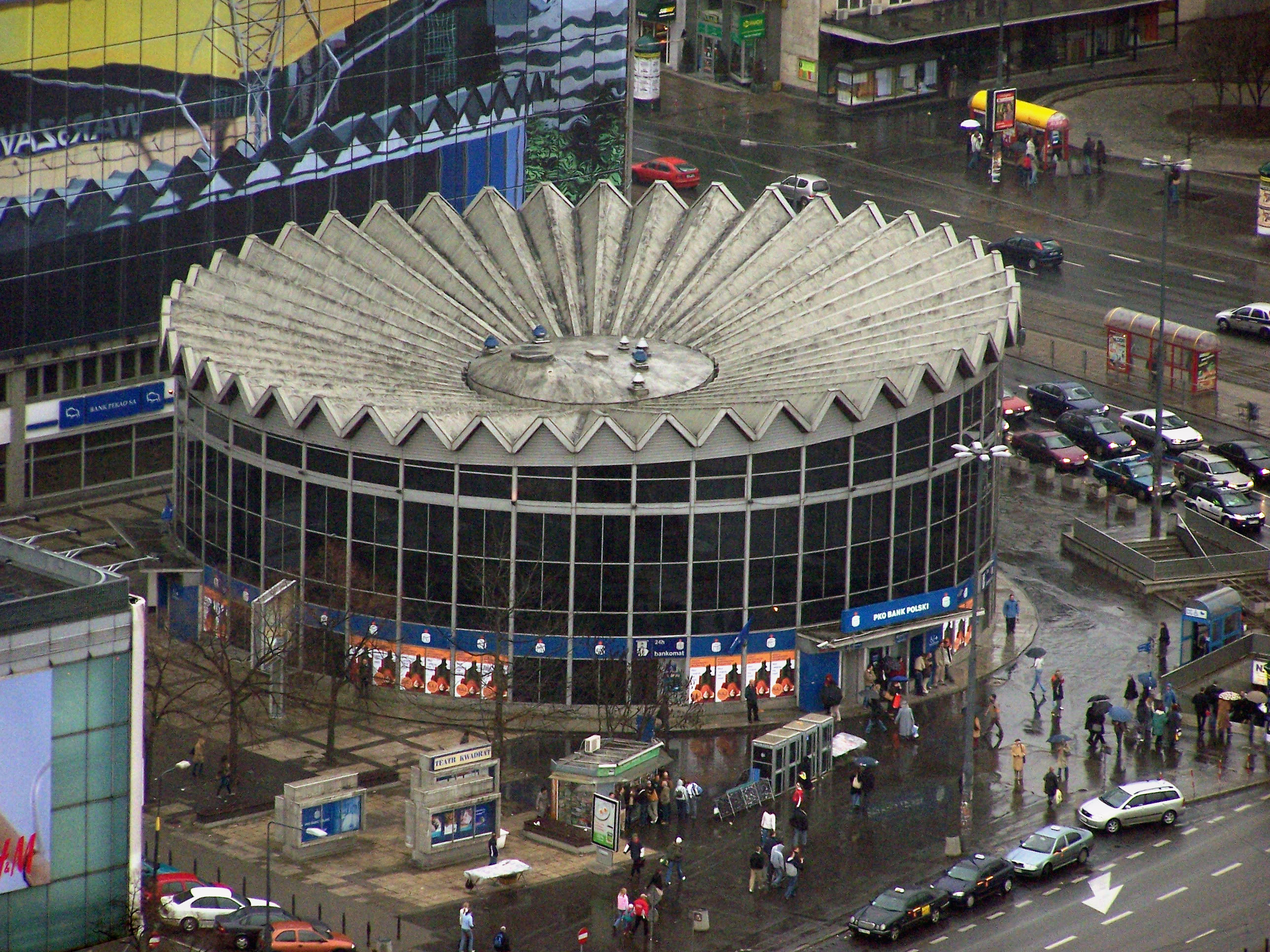 Rotunda PKO w Warszawie